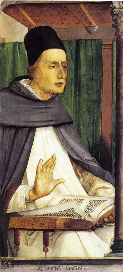 Alberto Magn (Alberto Magno) - Studiolo di Federico da Montefeltro